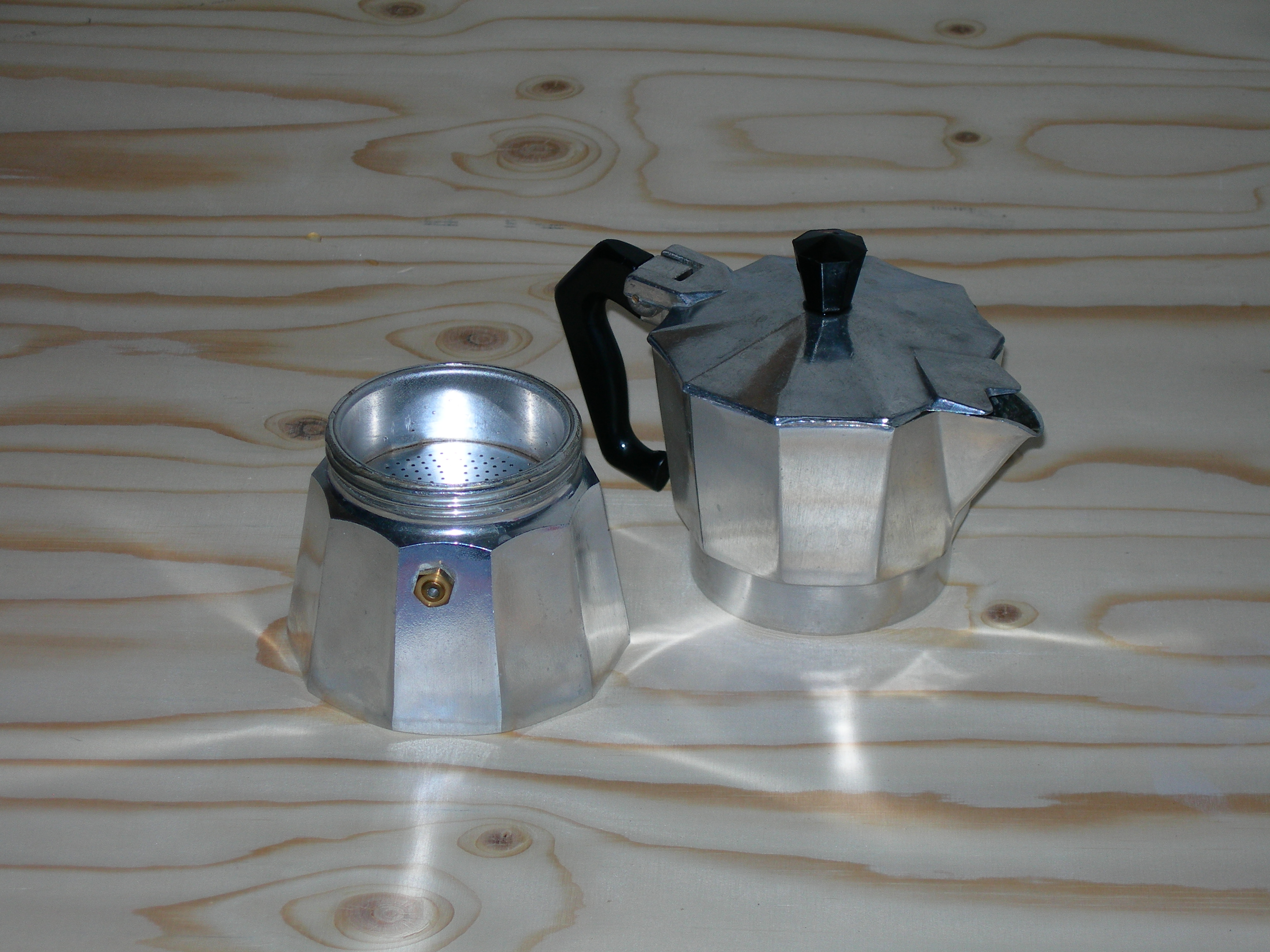 Een moka express, uitelkaar geschroeft.